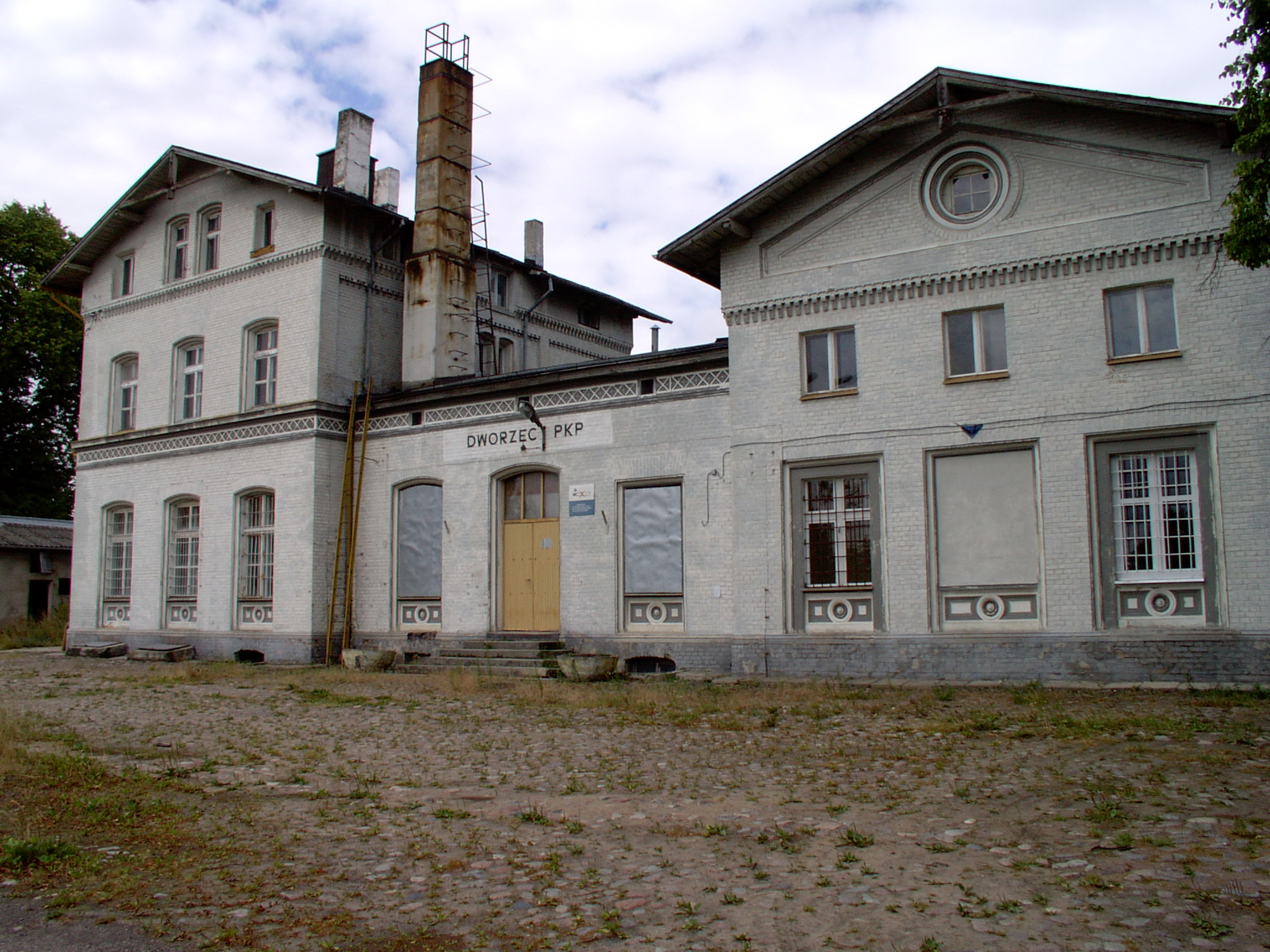 Dworzec kolejowy w Skandawie, od ulicy